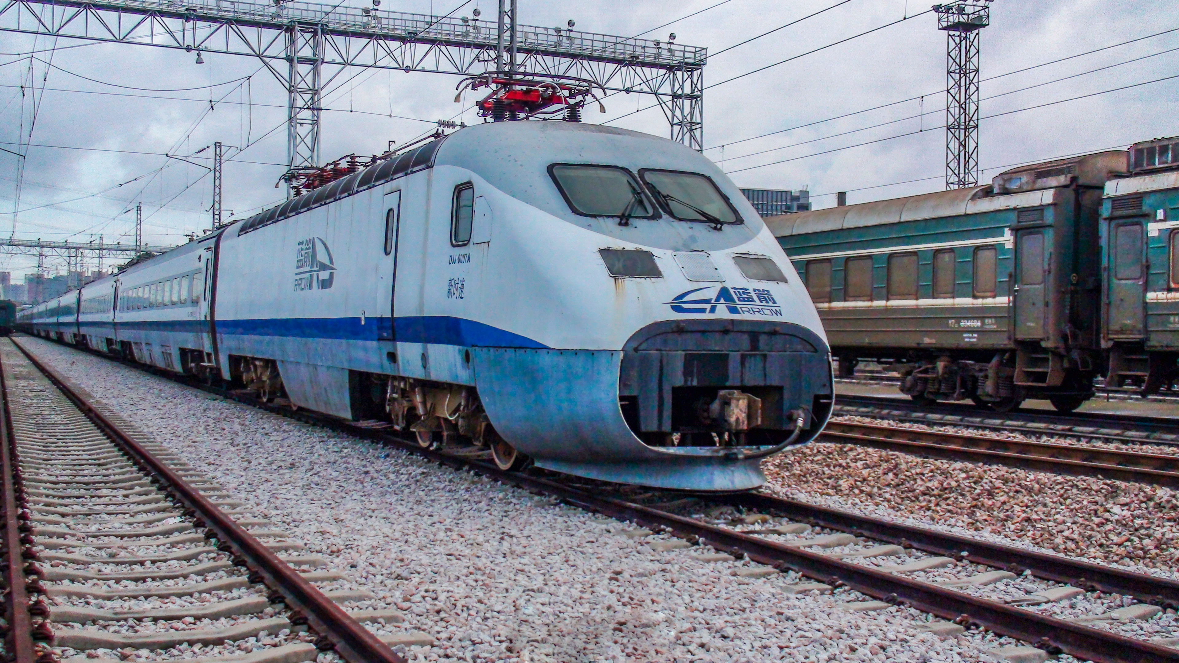 中文（中国大陆）: 新时速-蓝箭动车组（DJJ1_0007A）停放于平湖南站